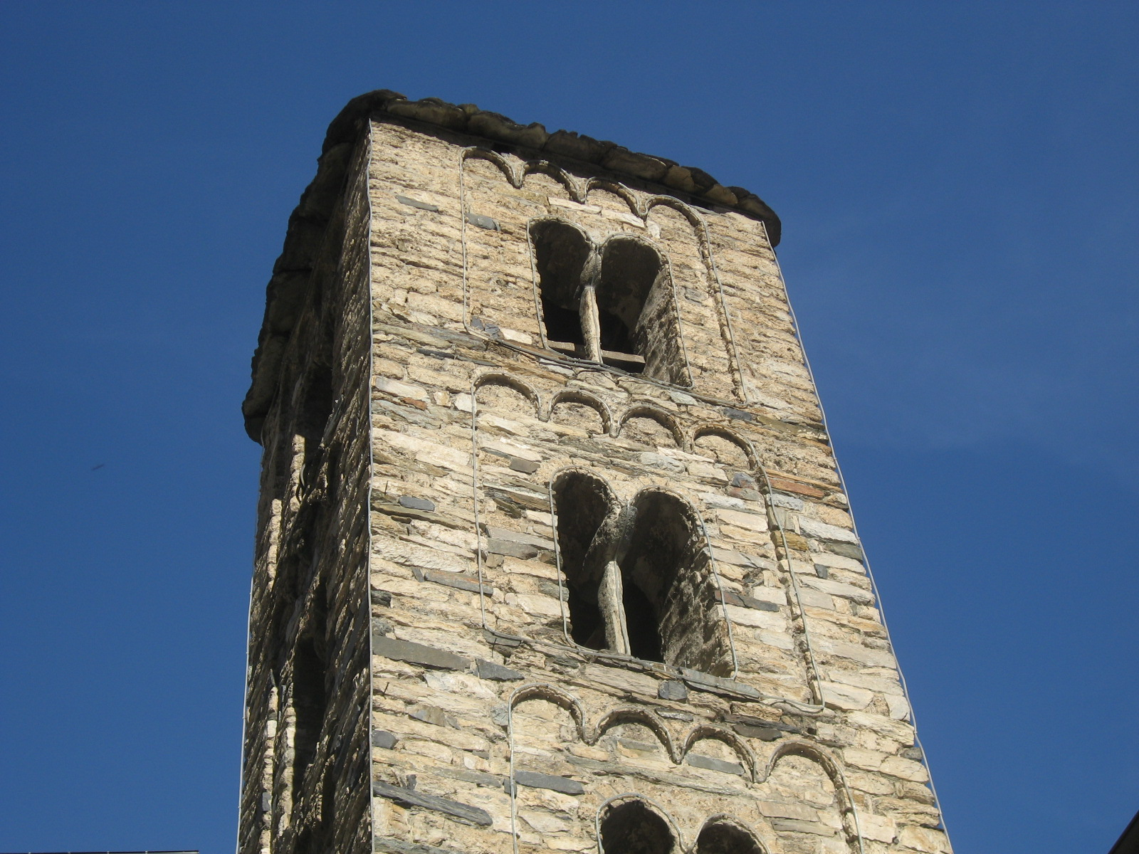 Church: Sant Julià i Sant Germà